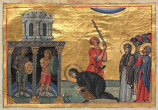 Irais